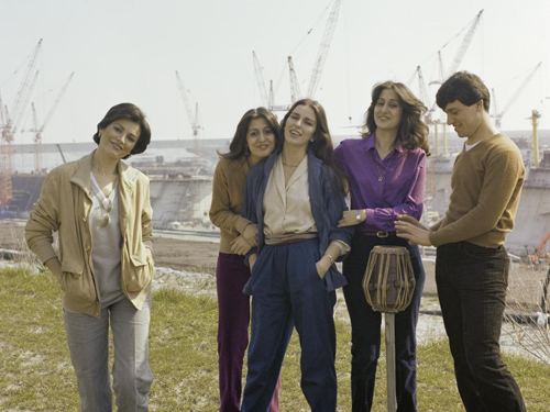 De Turkse zangeres Ajda Pekkan en haar groep tijdens een fotosessie voor het Eurovisie Songfestival 1980